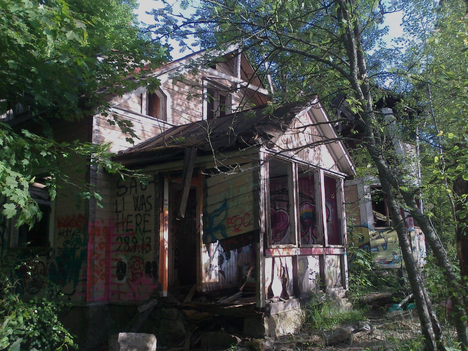 Ränsistynyt huvila Laajasalon Kruunuvuoressa.